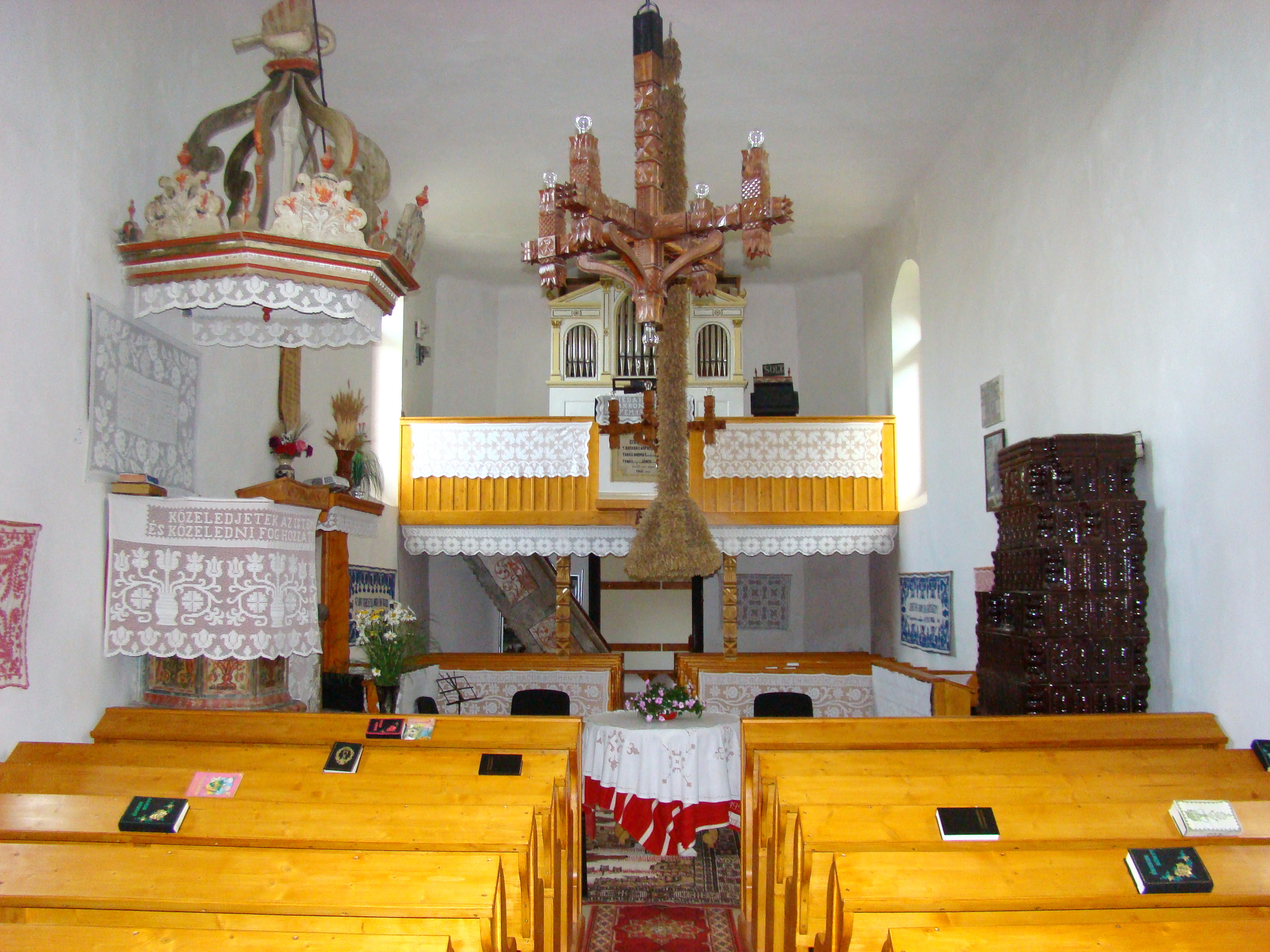 Biserica reformată, sat Alunișu; comuna Sâncraiu, județul Cluj